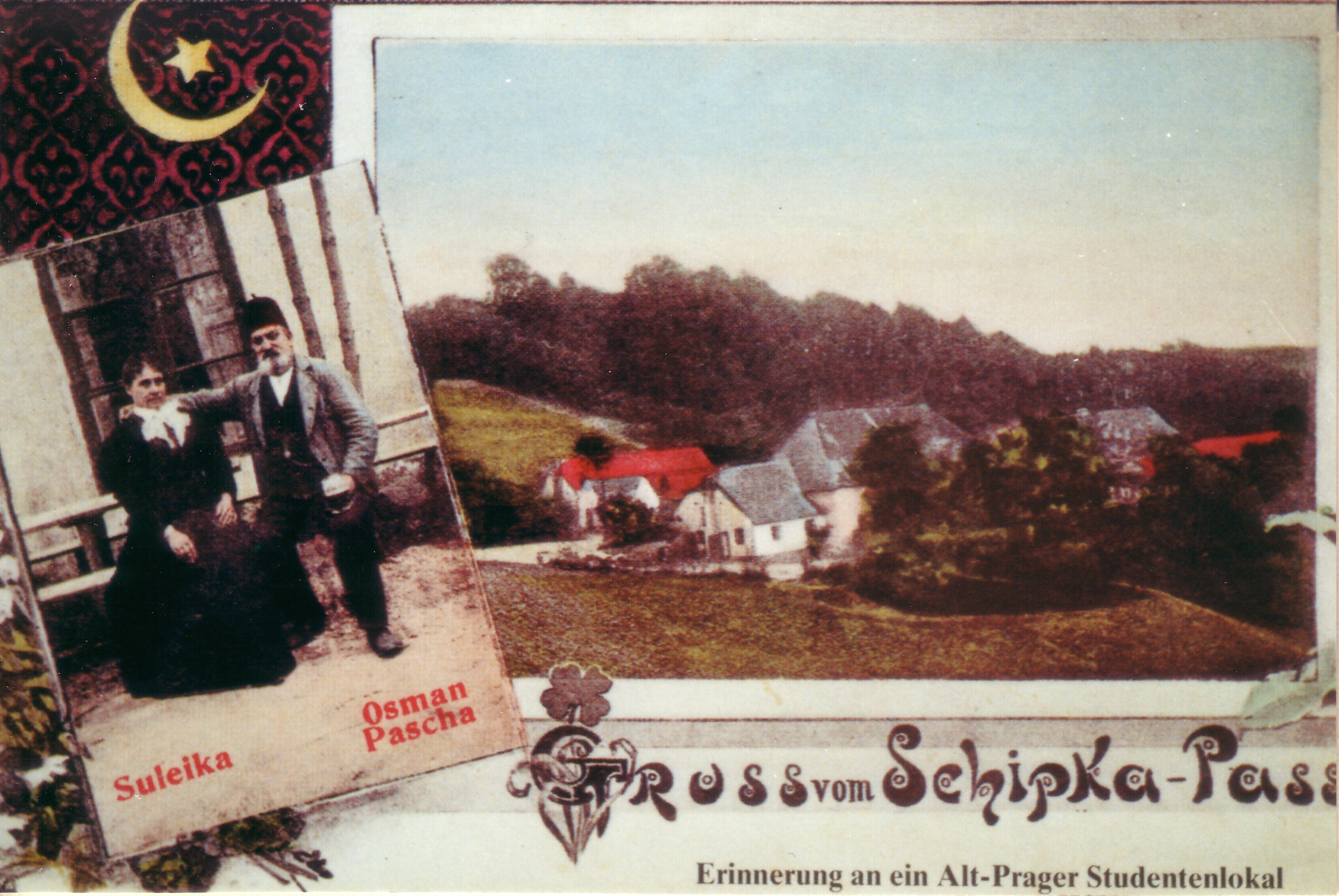 Postkarte des Prager Ausfluglokals "Schipkapaß". Das Lokal existiert heute nicht mehr, Ruinen finden sich am heutigen Stadtrand von Prag-Dejvice oberhalb des Šarka-Tales bei der ulice Zlatnice (Schipkapass#Schipkapass anderswo).